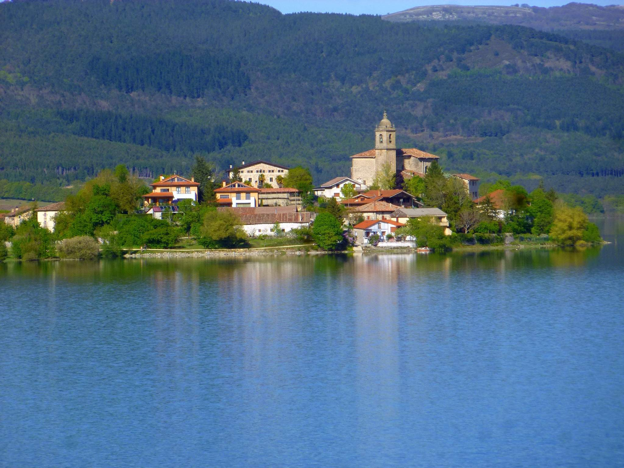 Embalse de Ullíbarri-Gamboa (Álava)